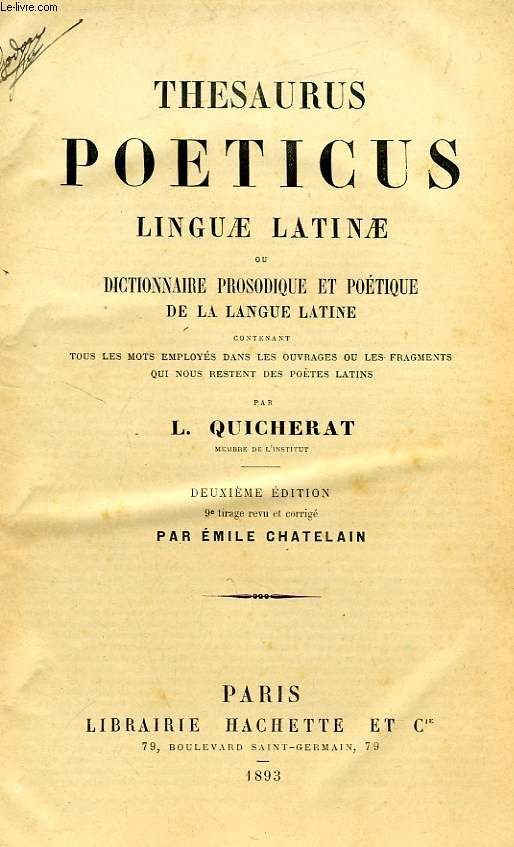 couverture du Thesaurus, par Louis Quicherat